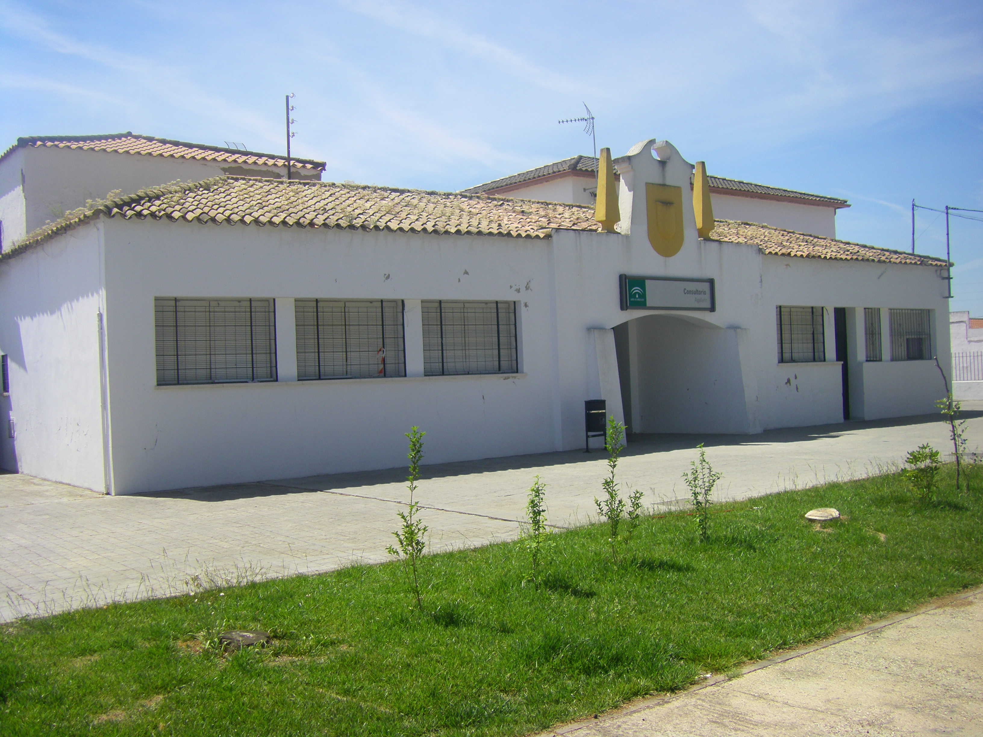 Edificio que albergaba de manera separada, las escuelas para niños y niñas.